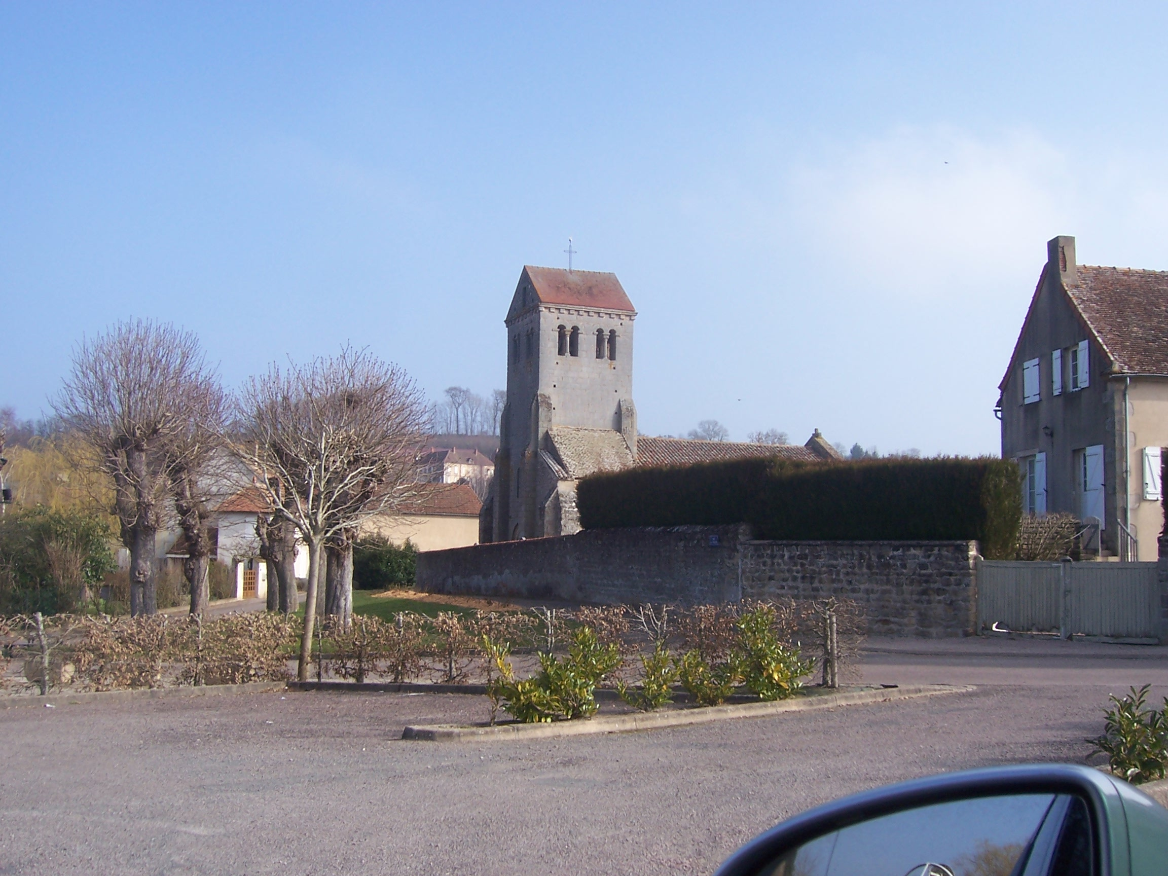 Eglise de Curgy